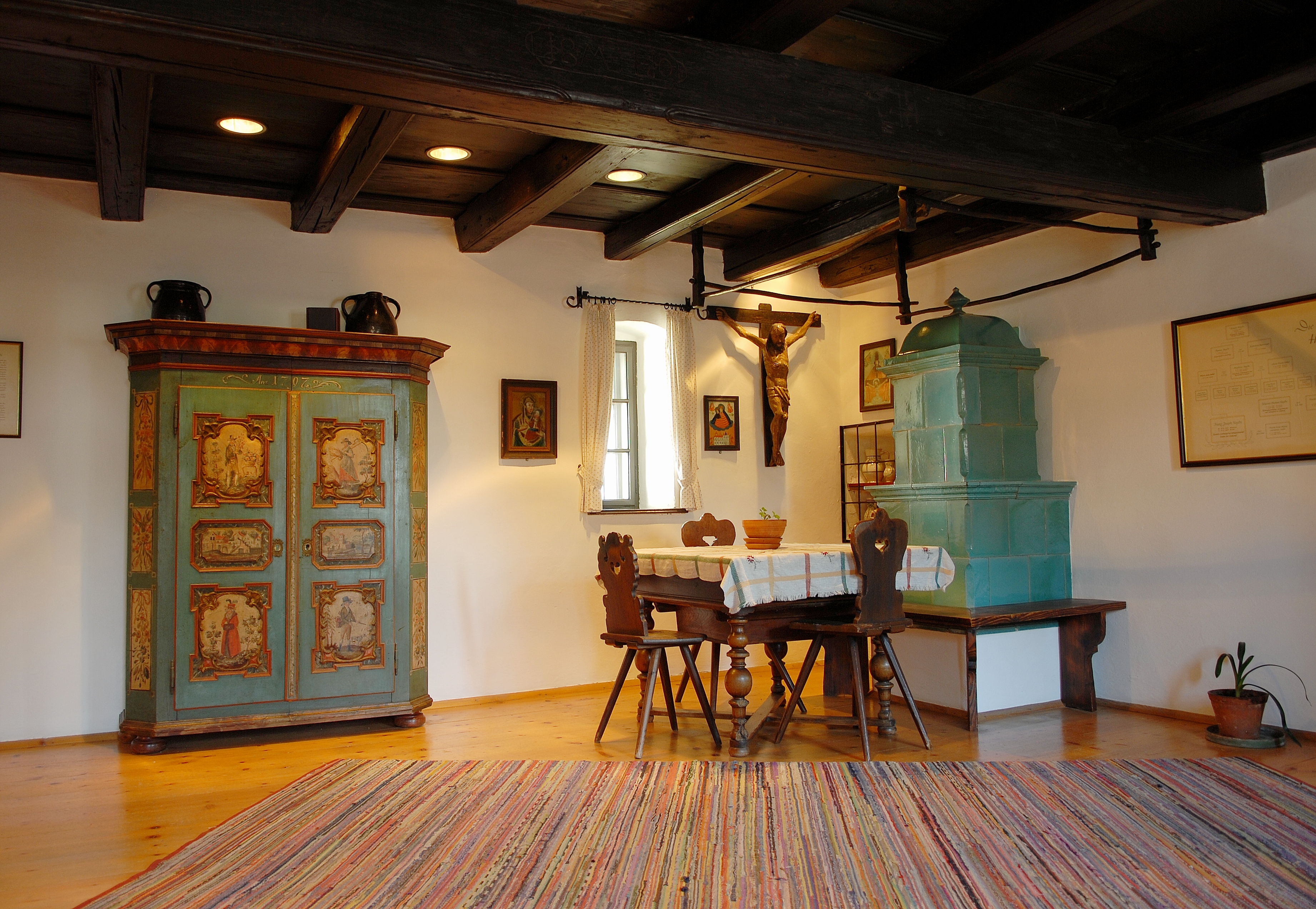 Wohnstube im Haydn-Geburtshaus :Category:Cultural heritage monuments in Rohrau